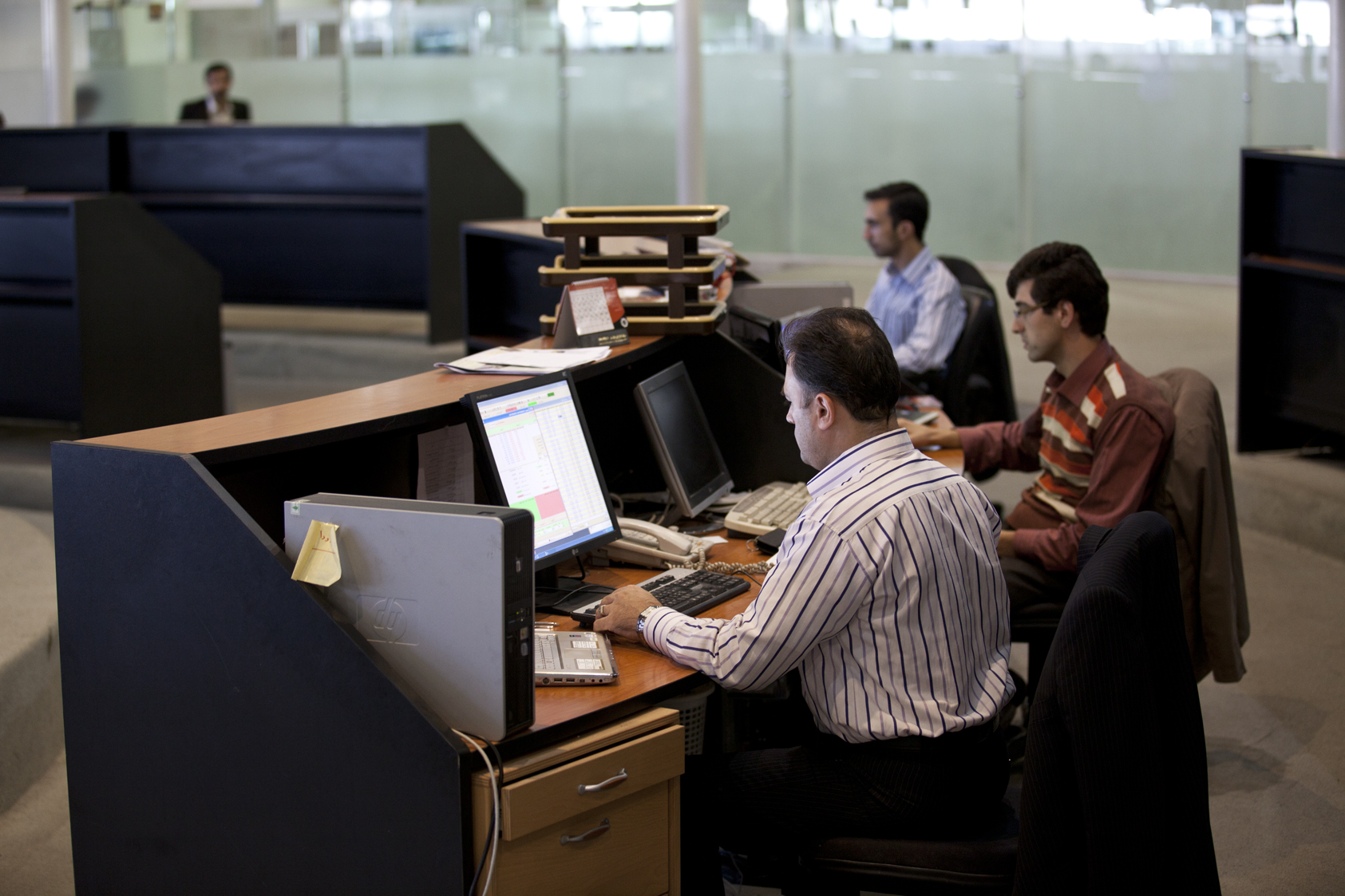 تالار بورس اوراق بهادار تبریز